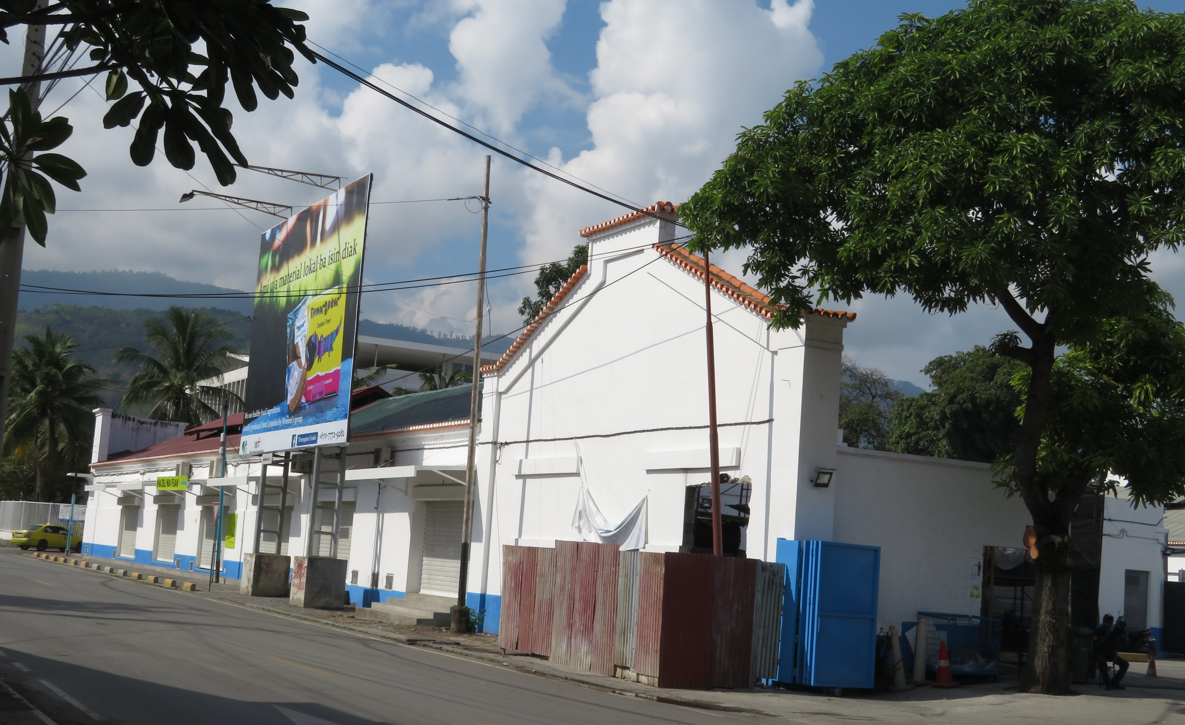 Edificio adminstrativo (constr. em 1948/49) da SAPT, Dili, Timor Leste